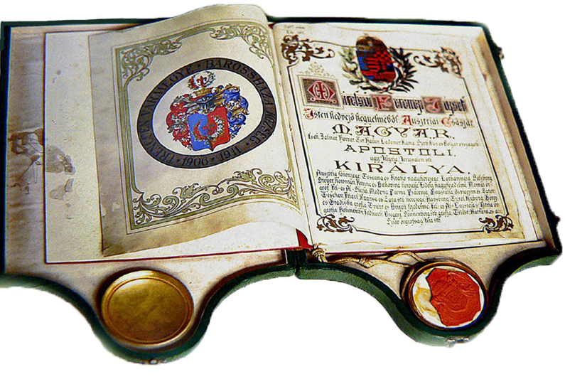 Erbová listina udelená Pružine 5. decembra 1911 c.a.k. Františkom Jozefom I.